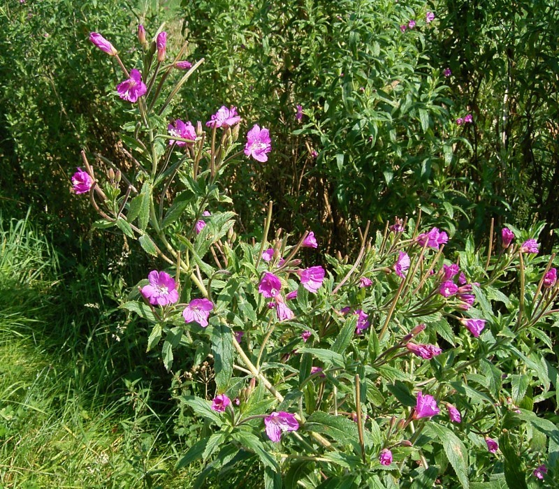 Epilobium hirsutum